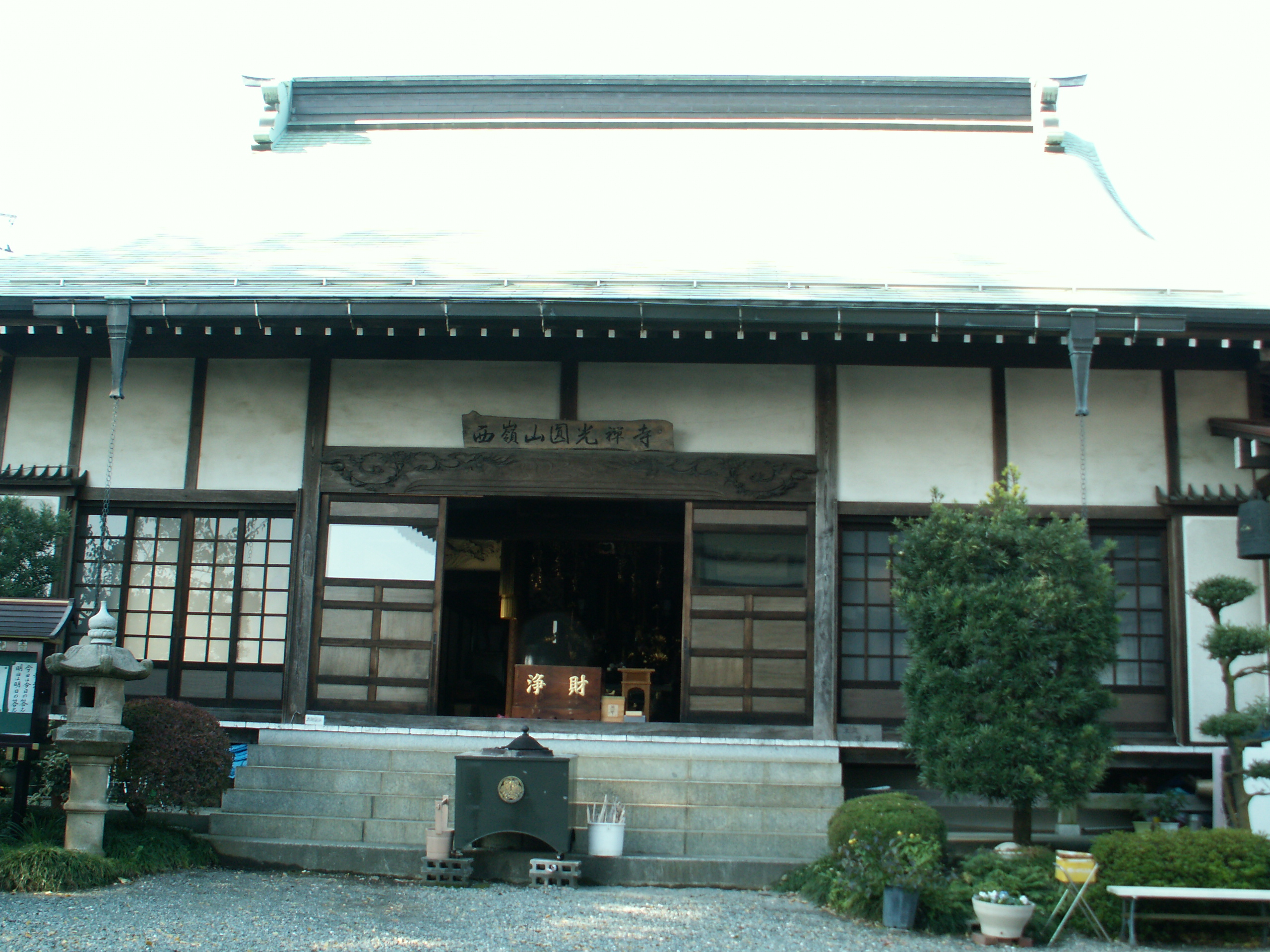 円光寺 (厚木市)本堂